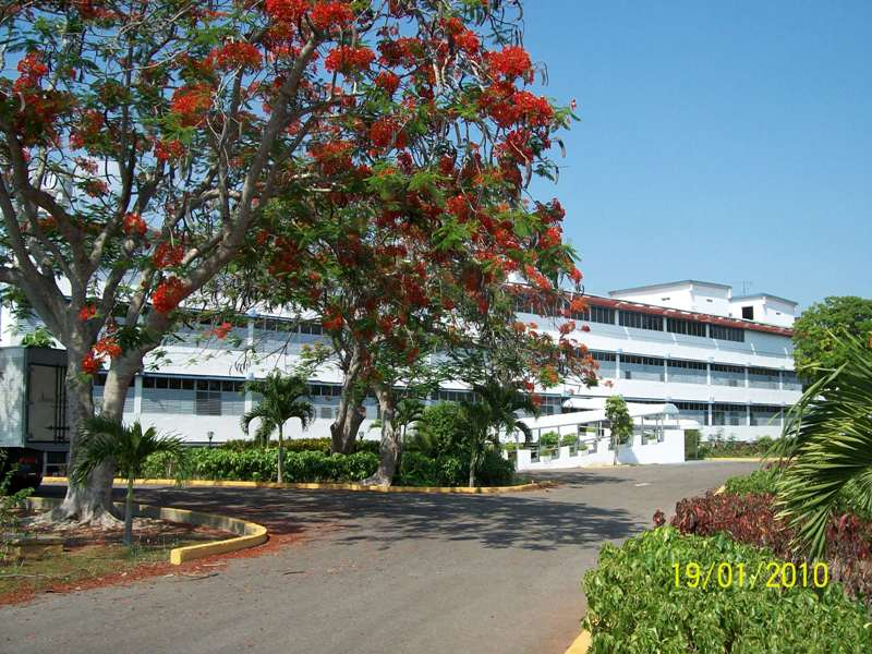 Hospital del Nuevo Programa de Formacion de Medicos Latinoamericanos en Jaguey Grande